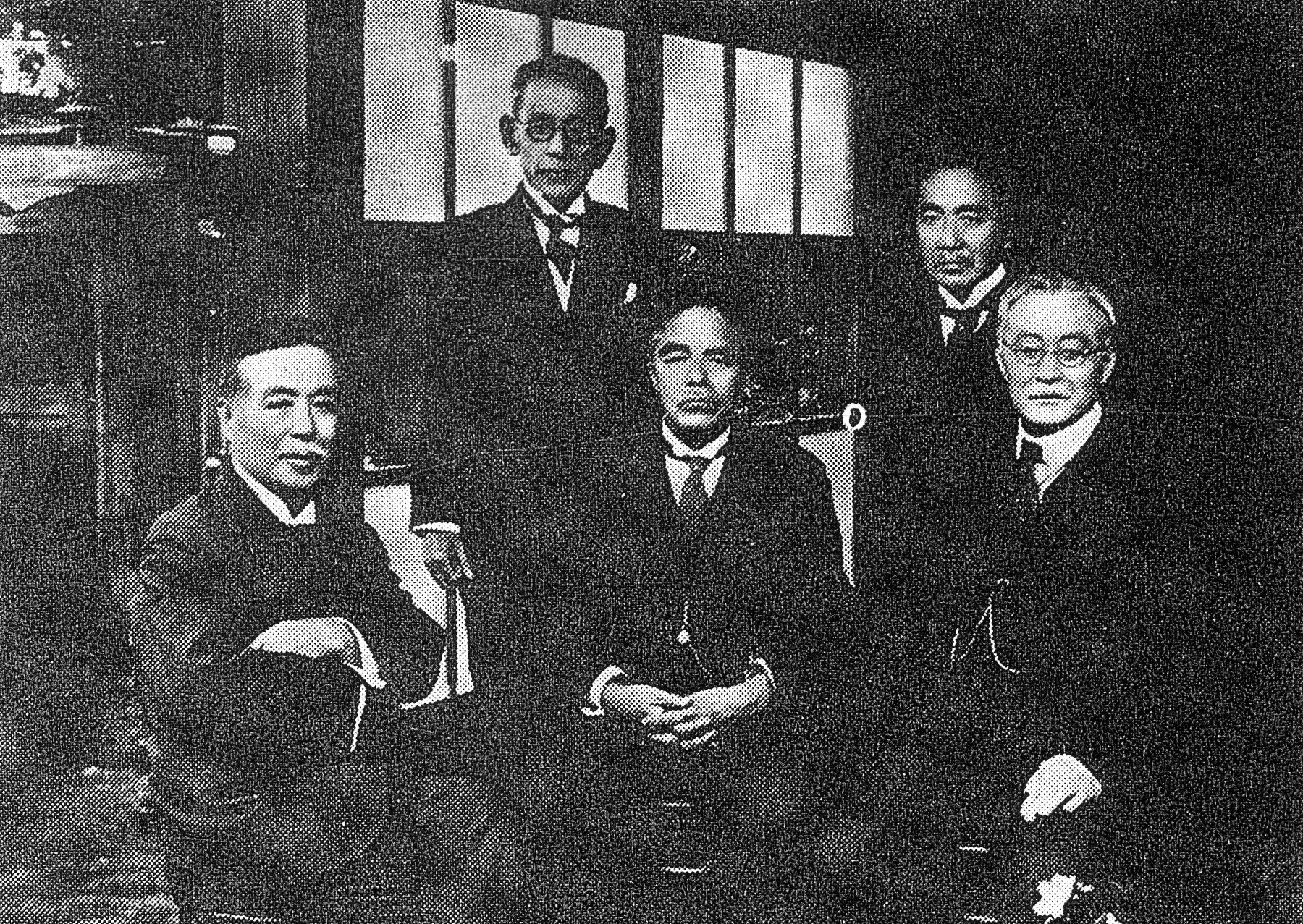 1928年6月2日にメリマン・ハリスによる受洗記念に、青山墓地のハリスの墓参りをしに集まった、札幌農学校の元生徒5人の広井勇、内村鑑三、新渡戸稲造、伊藤一隆、大島正健